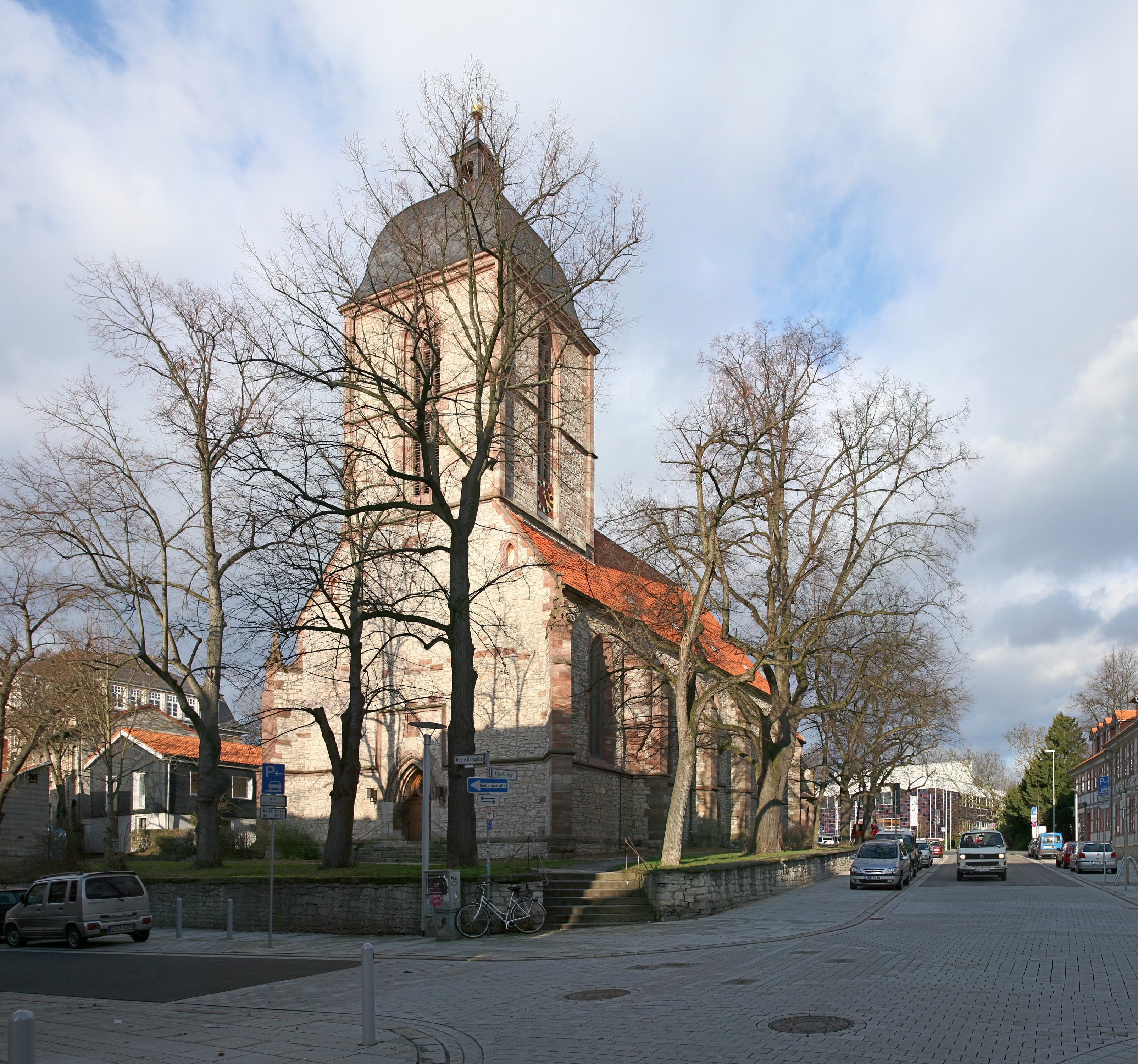 St. Albani church, Göttingen, Germany